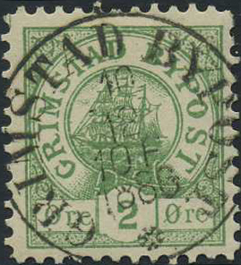 Почтовая марка местной почты в Гримстаде (Норвегия), 1887